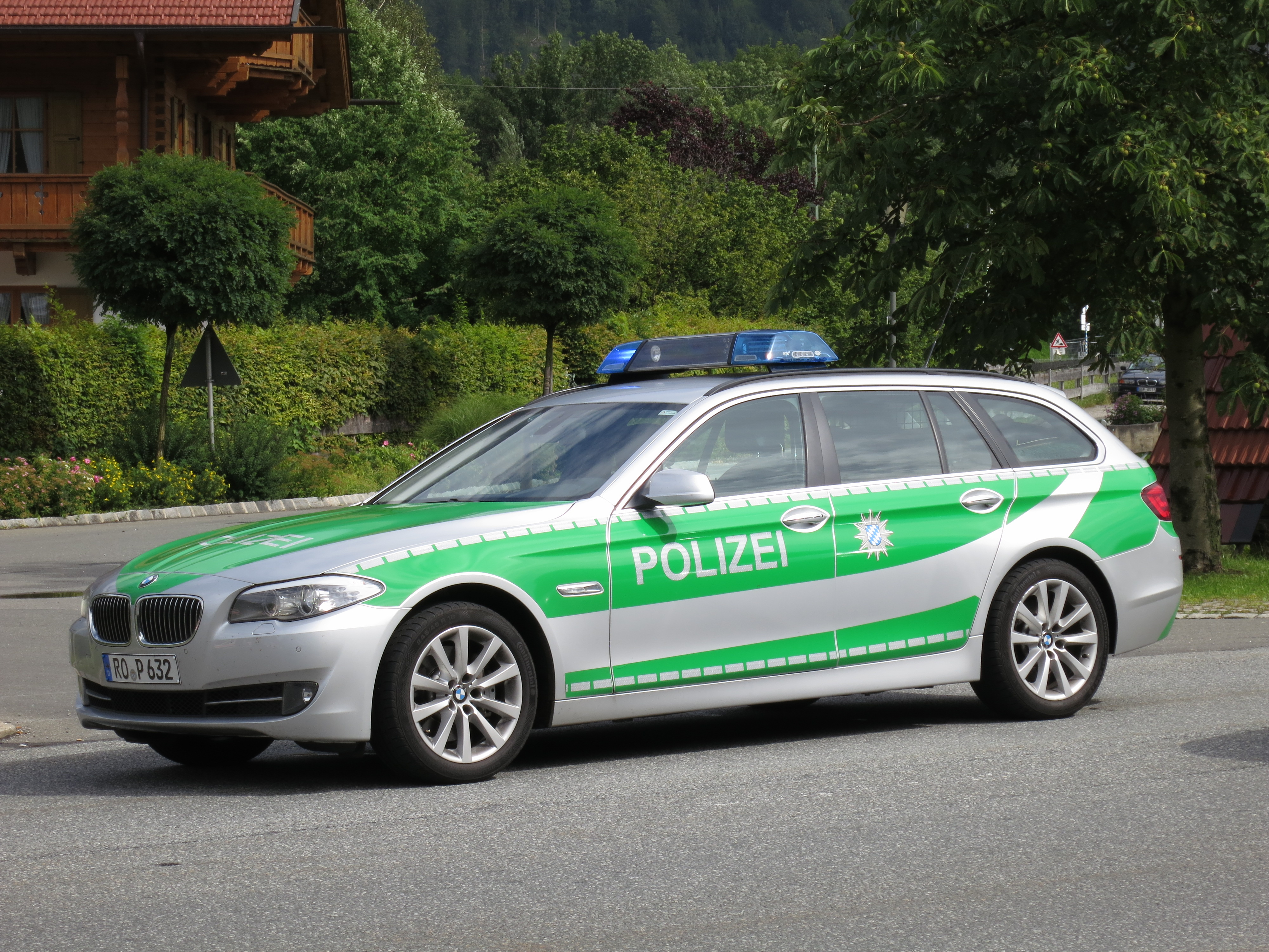 Polizei-BMW in Bayern